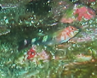 Axoclinus cocoensis en Roca Sucia, islas Cocos